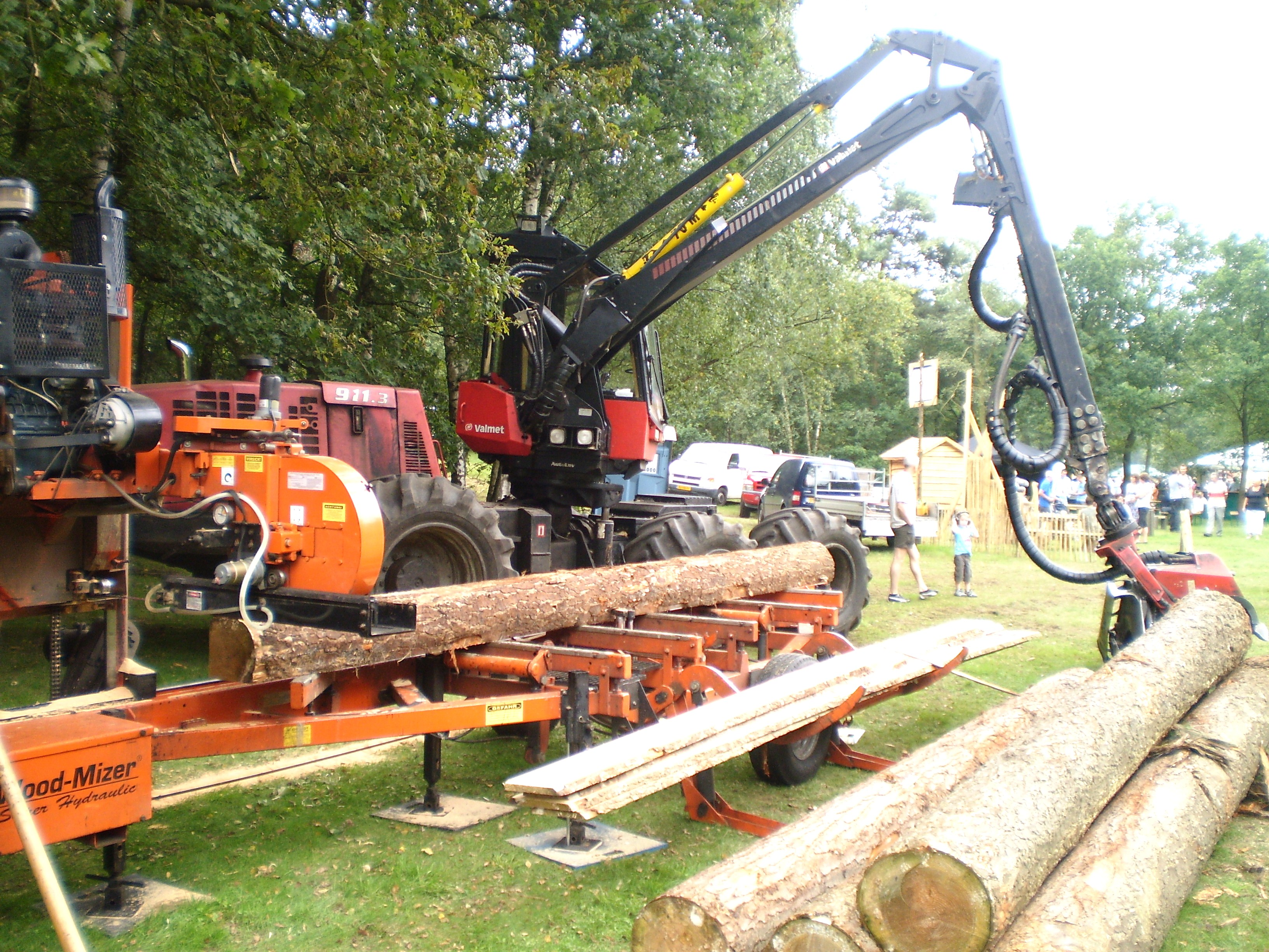 Houthakkersfees 2010 mechanisatie